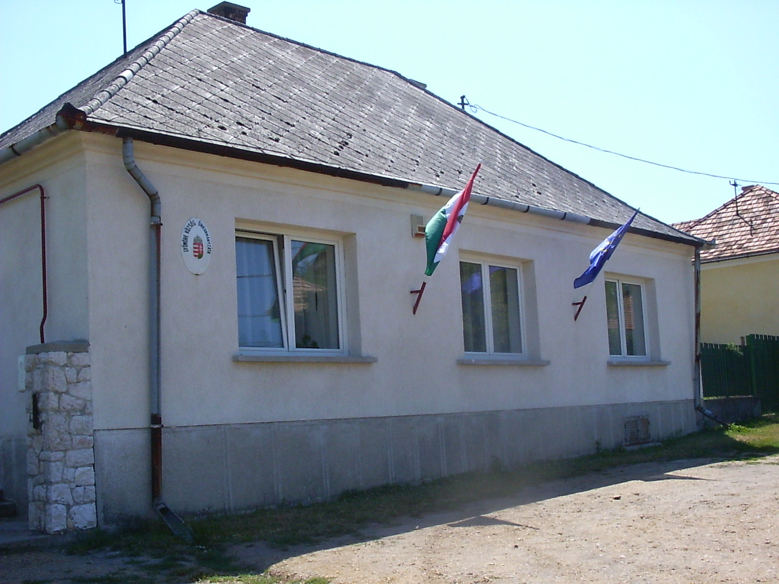 Gyömörei községháza